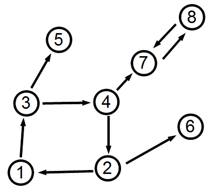 Beispielgraph zur Konstruktion einer Google-Matrix mit 2 dangling nodes